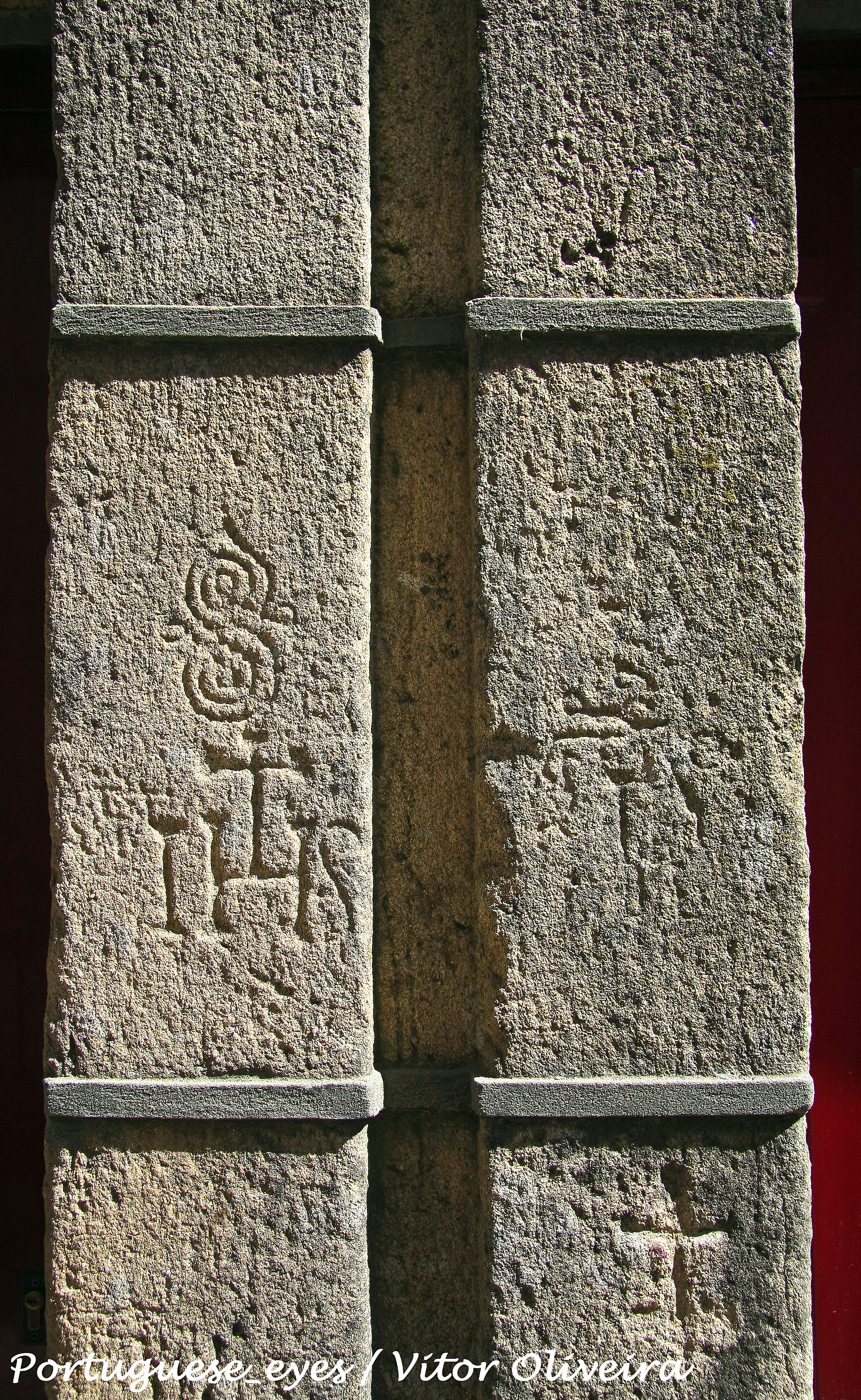 Na Guarda, no espaço intra-muros e ruas adjacentes, a Simbolo­gia Cruciforme impera fazendo-se acompanhar, por vezes, de datas e anagramas religiosos que merecem especial referência pelo seu valor patrimonial e estético. Sem querermos avançar com uma explicação única para a existên­cia deste património, apontamos alguns factos históricos que poderão conduzir à sua compreensão. Sabe-se que a Guarda acolheu uma comunidade judaica a partir do séc. XIII, a qual cresceu, quer com as perturbações e perseguições aos praticantes da Lei Velha acontecidas do outro lado da fronteira durante o século XIV, quer com a expulsão destes de alguns reinos de Espanha no final do século XV. Estabelecida a Santa Inquisição em Portugal durante a 1ª metade do século XVI, cedo se iniciaram as perseguições sistemáticas que vi­savam tornar o país numa nação liberta dos judeus e das suas crenças e práticas. Foi neste contexto de perseguições que os praticantes da Lei Velha foram forçados à conversão ou à fuga. Aos convertidos é atribuído, por vezes, o nome de Cristãos-Novos, os quais, para demonstrar a sua adesão ao novo credo podem ter marcado nas ombreiras das suas casas símbolos cruciformes. Outros, recusando-se à conversão, optaram pela fuga, abandonando as suas casas, posteriormente, ocupadas por famílias cristãs que, através da marcação de cruciformes, podem ter procurado a purificação e a sacrali­zação de um espaço, anteriormente, habitado por judeus. Refira-se ainda que a Idade Moderna foi um período de exacerbação da fé Católica, o que poderá ter conduzido os crentes a exteriorizar a sua fé através da gravação da Cruz entendida como expressão paradigmática dó crença Deus único, Cristo crucificado. See where this picture was taken. [?]